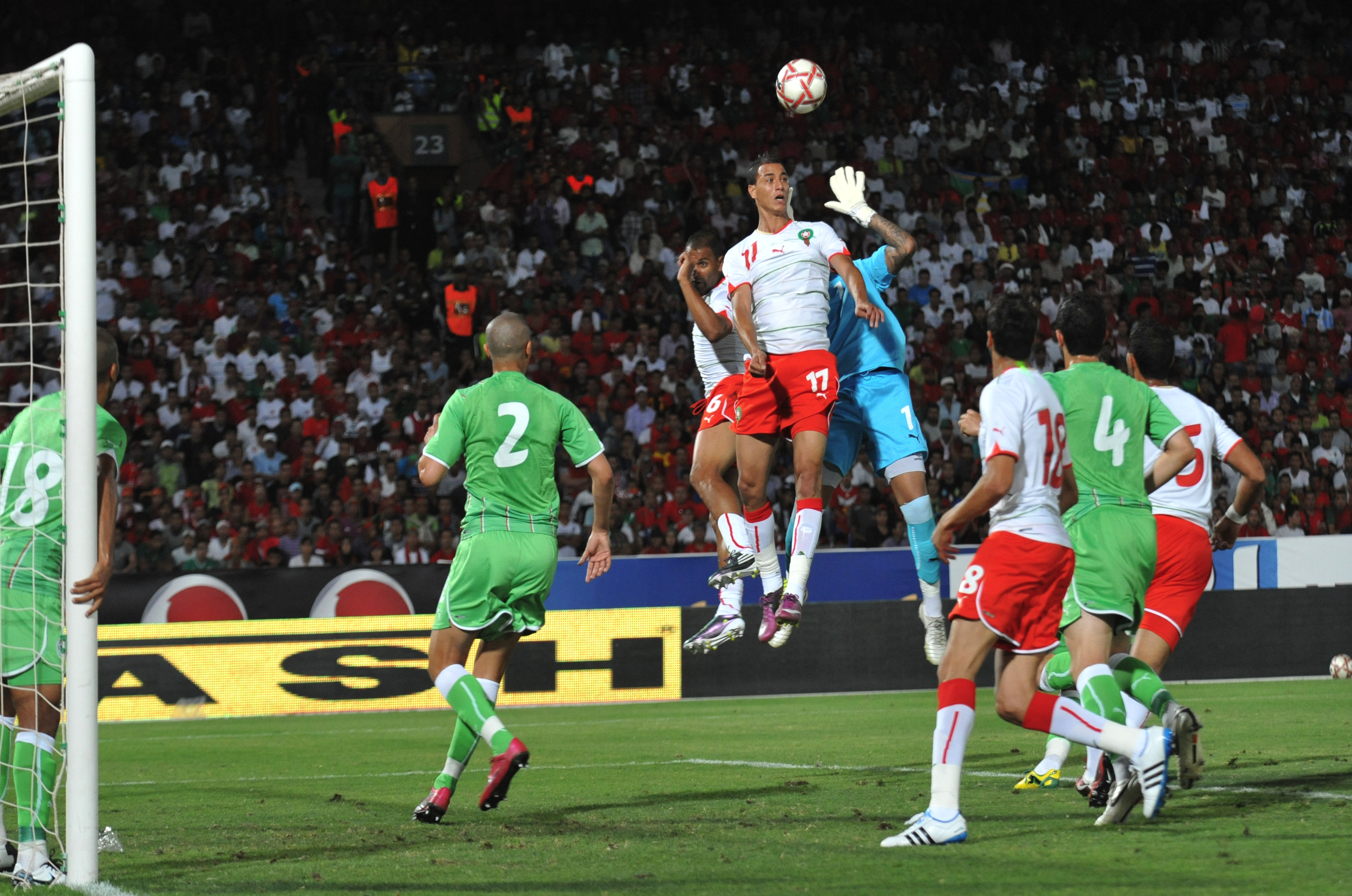 Match Maroc - Algérie